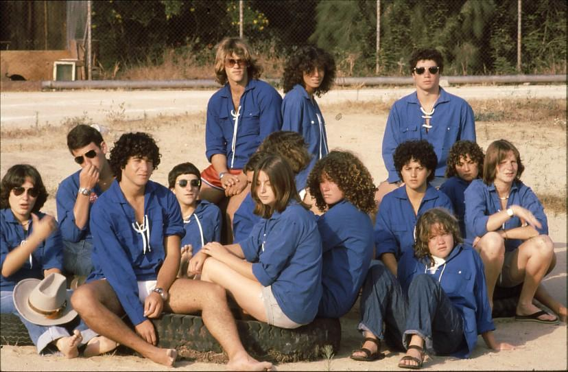 גן-שמואל - קבוצת 'מעין' 1981